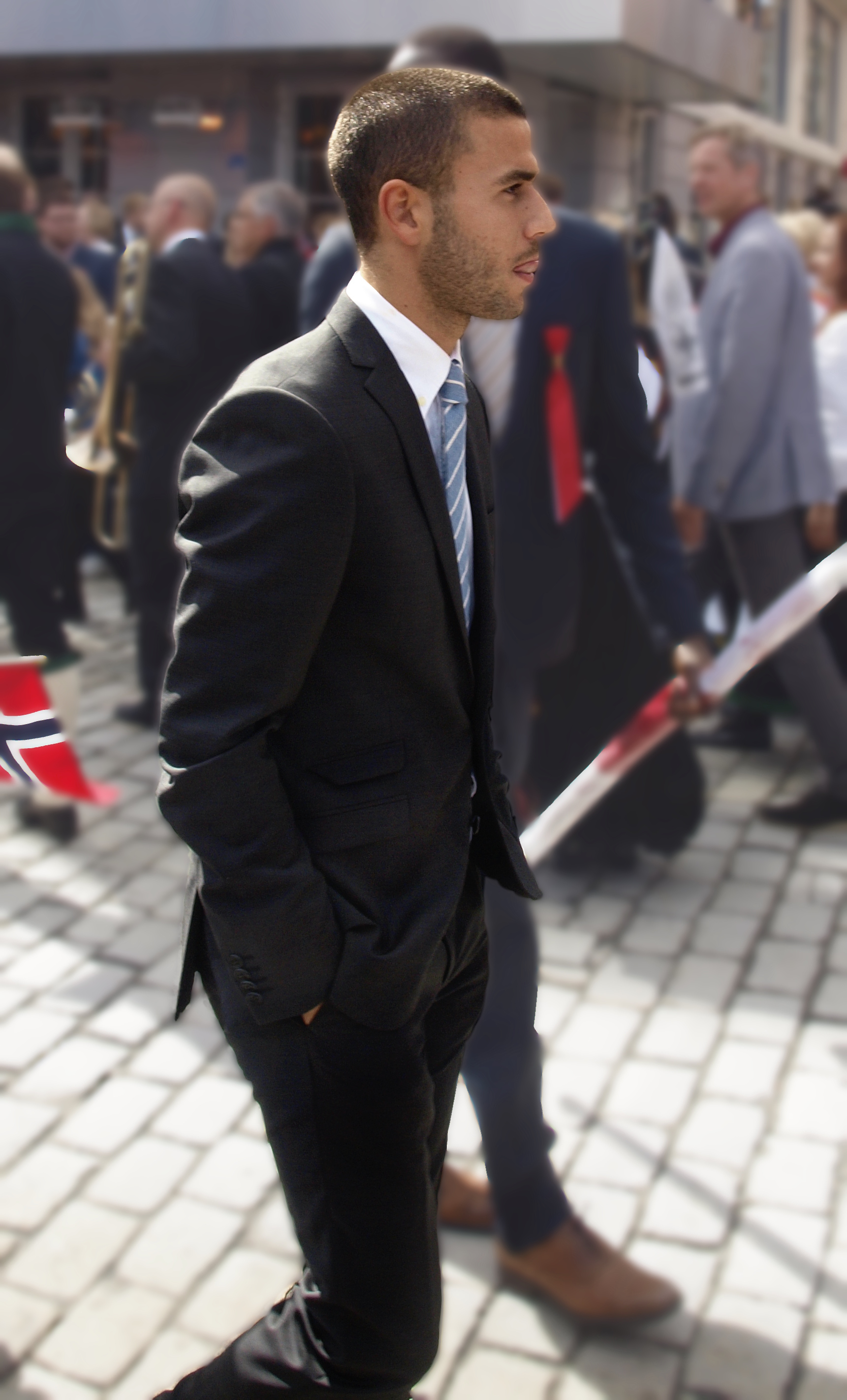 Erdin Demir in 2014